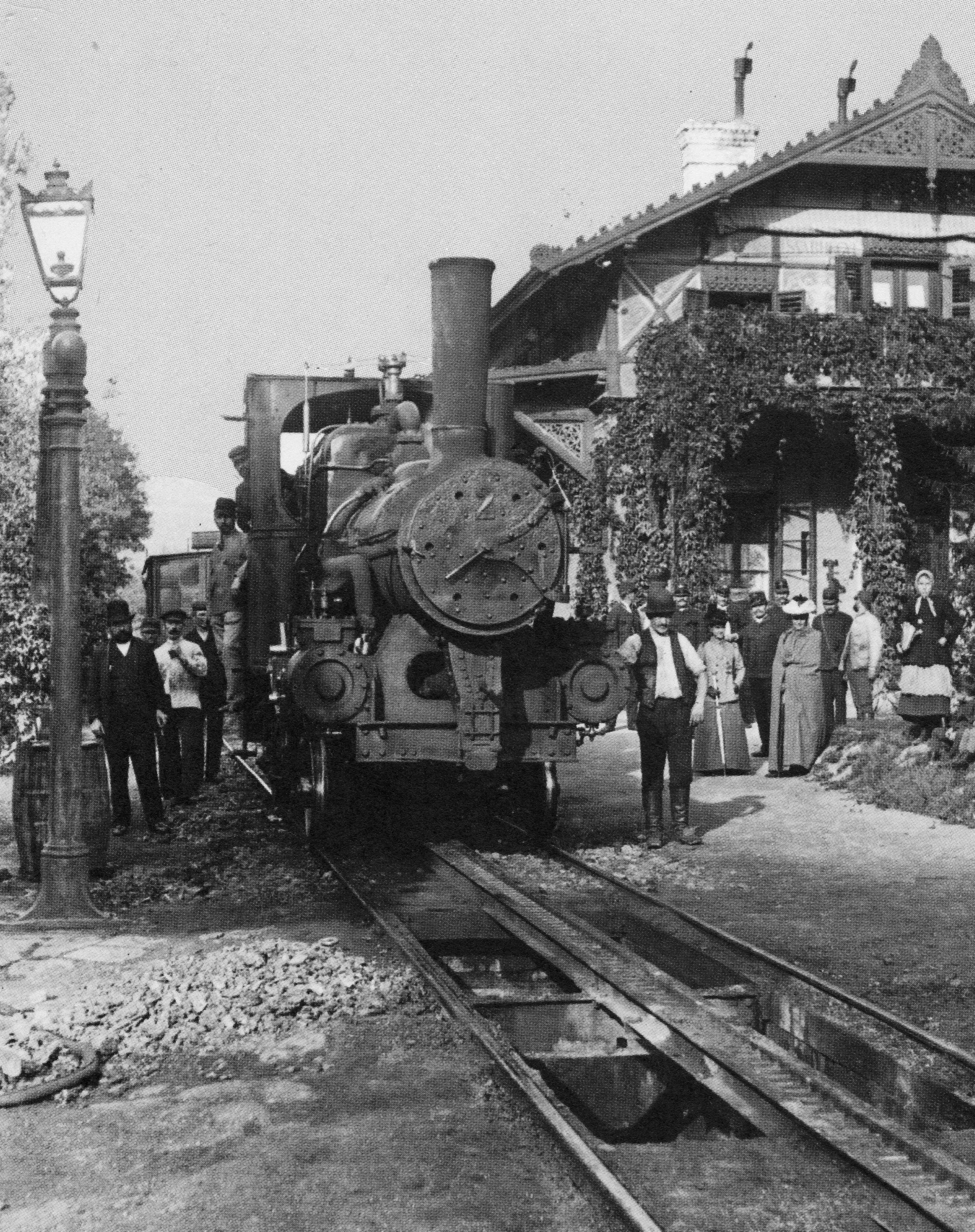 Budapest Városmajor